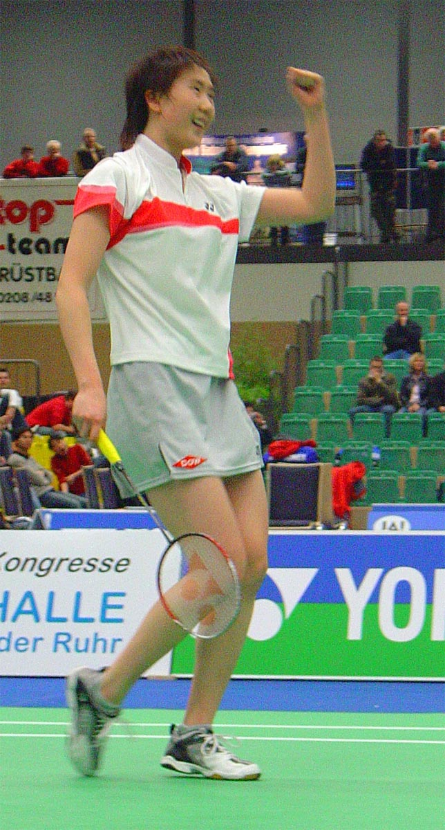 Lu Lan nach dem entscheidenden Punkt zum Finaleinzug während der German Open 2006